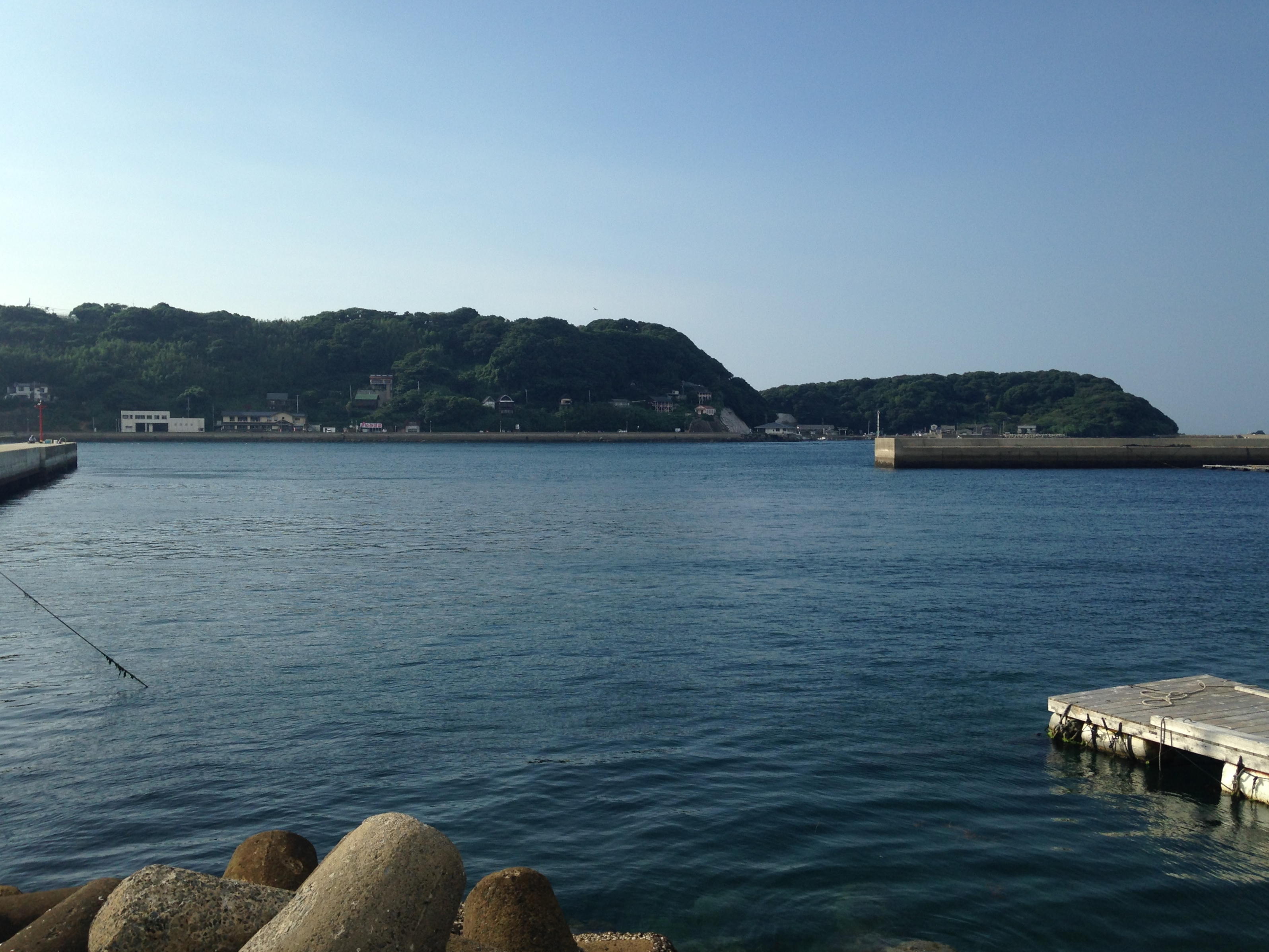 呼子町先方町より望む加部島